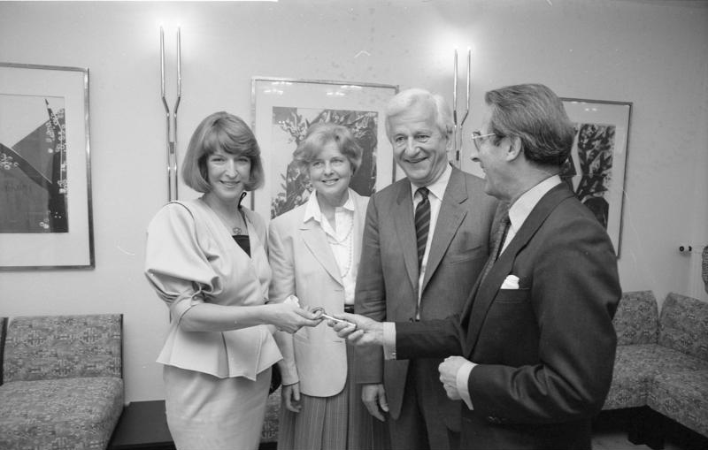 Bonn, 19. Juni 1990 Nach Abschluß der Sanierungsarbeiten im Bundespräsidialamt übergab die Präsidentin der Bundesbaudirektion, Barbara Jakubeit, dem Chef des Bundespräsidialamt, Staatssekretär Dr. Andreas Meyer-Landrut, symbolisch den "Goldenen Schlüssel" im Bundespräsidialamt.